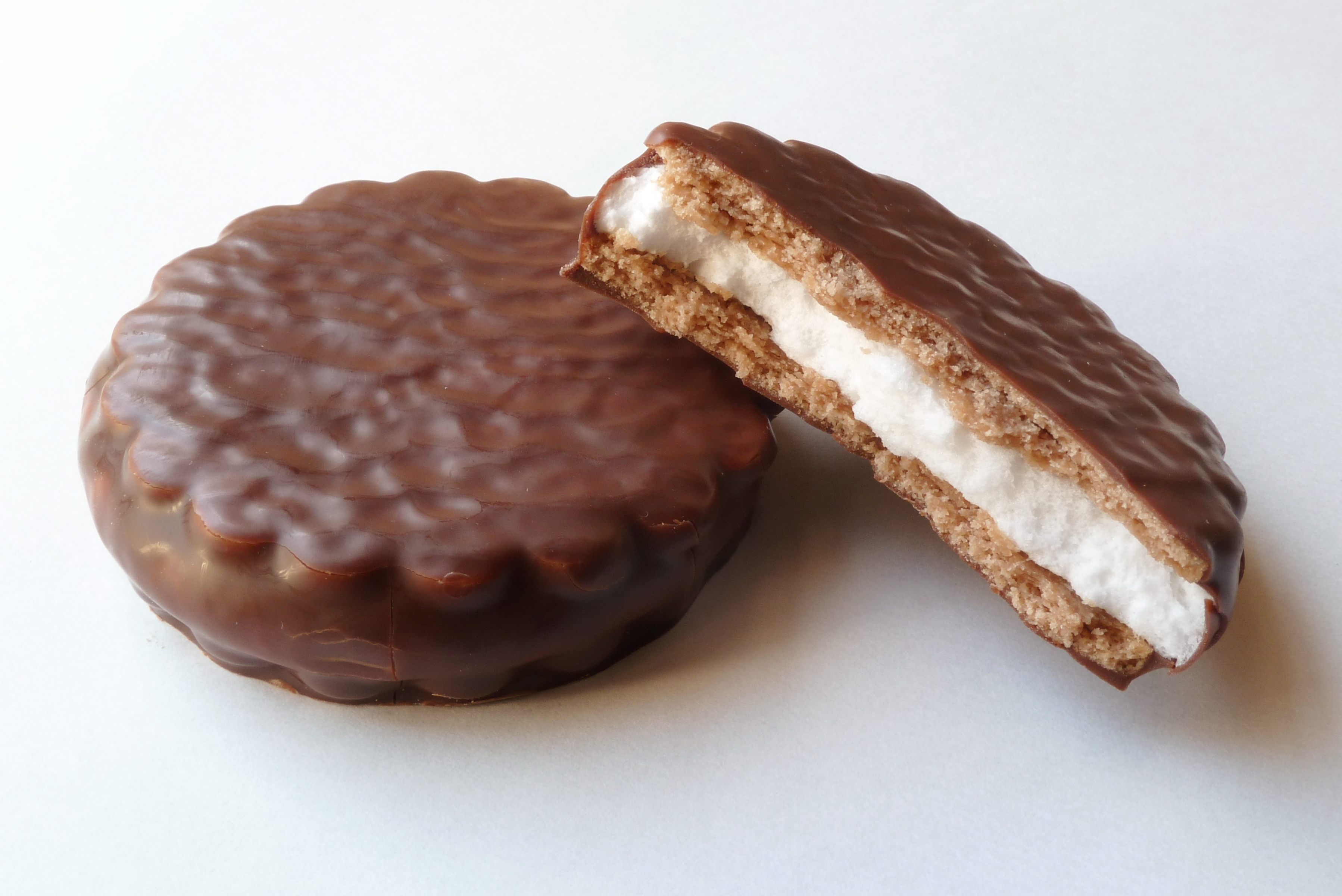 森永製菓が販売するパイ加工品「エンゼルパイ」のバニラ。レギュラーサイズ。